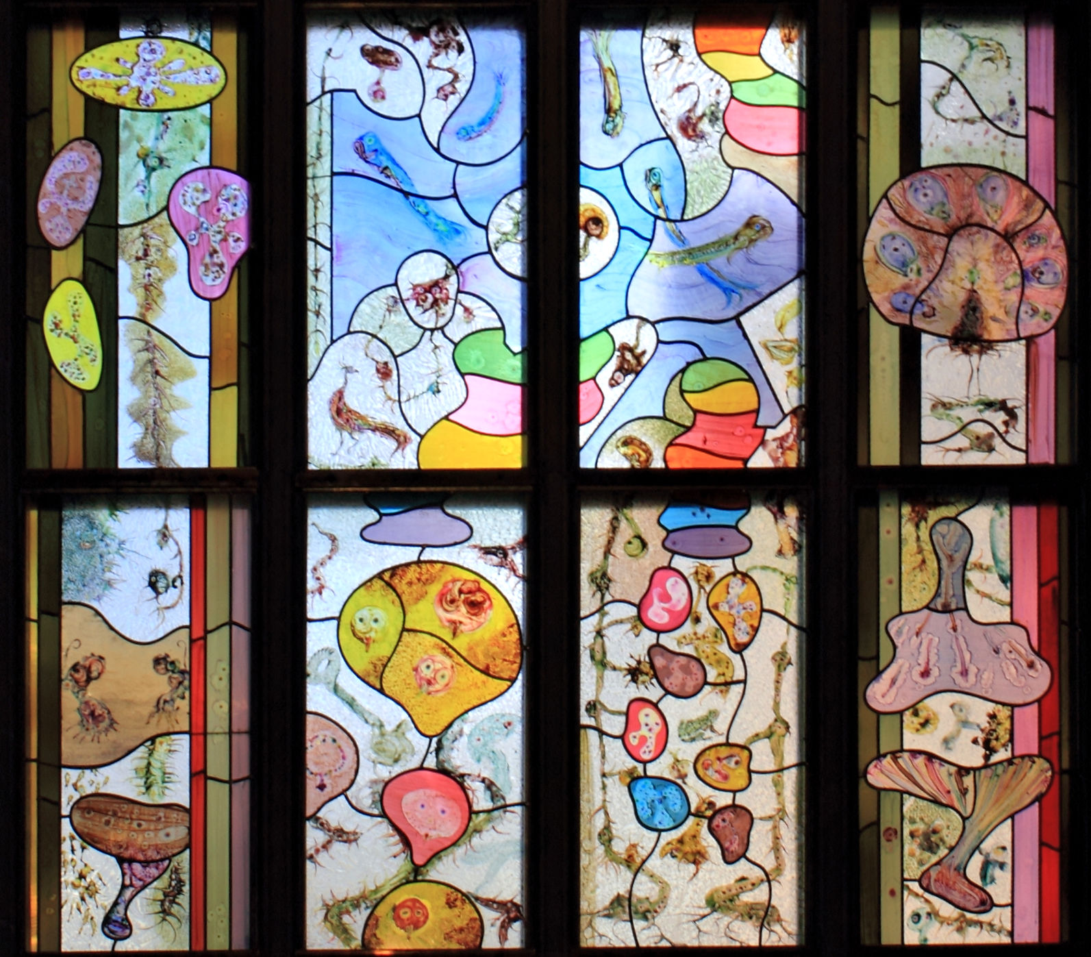 Een tuin van glas is een gedenkraam ter gelegenheid van het zilveren jubileum van koningin Beatrix. Het raam werd gemaakt door Marc Mulders en is in 2005 geplaatst in de Nieuwe Kerk in Amsterdam.